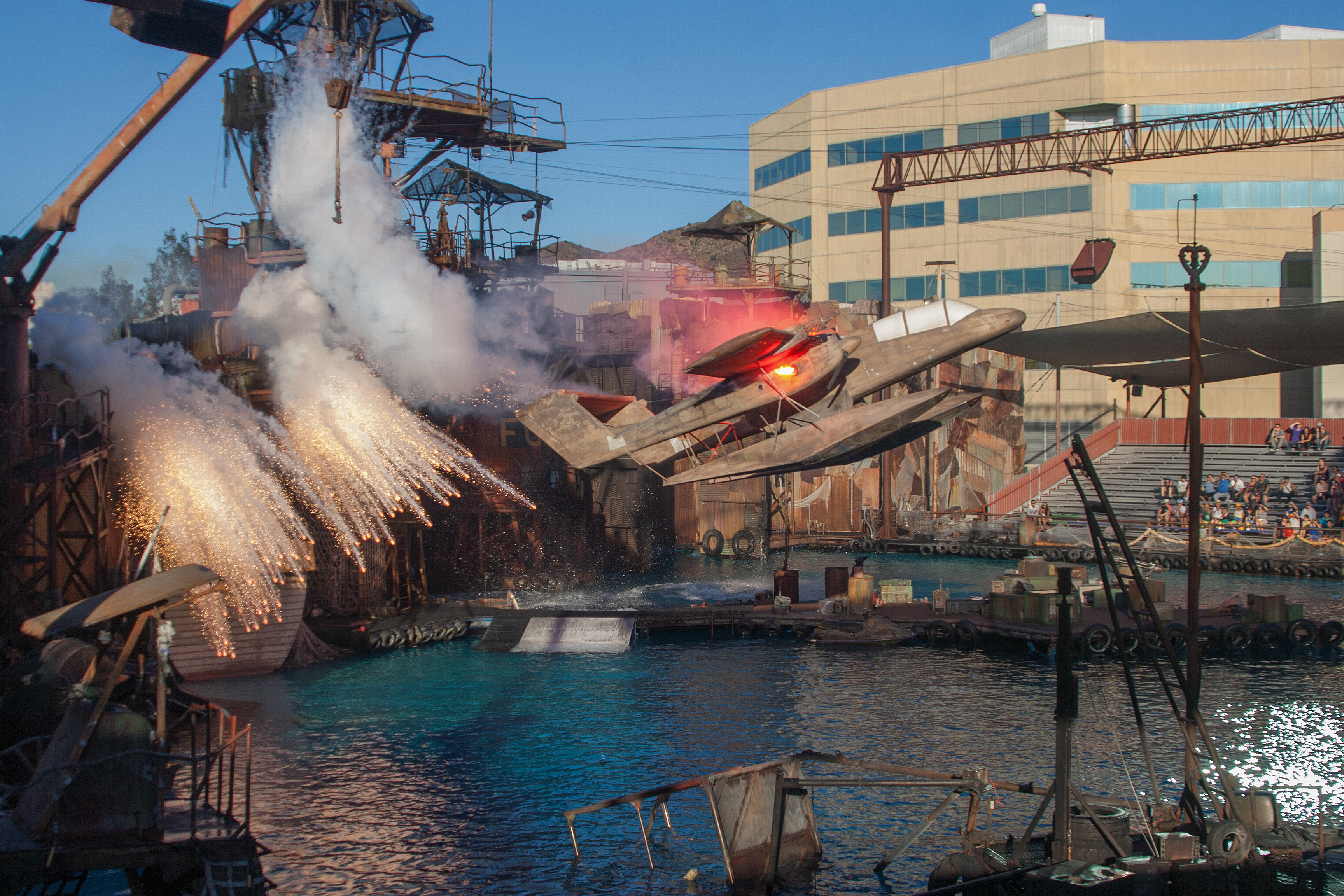 ...ein Actionspektakel auf dem Universalgelände Hollywoods Kalifornien / USA